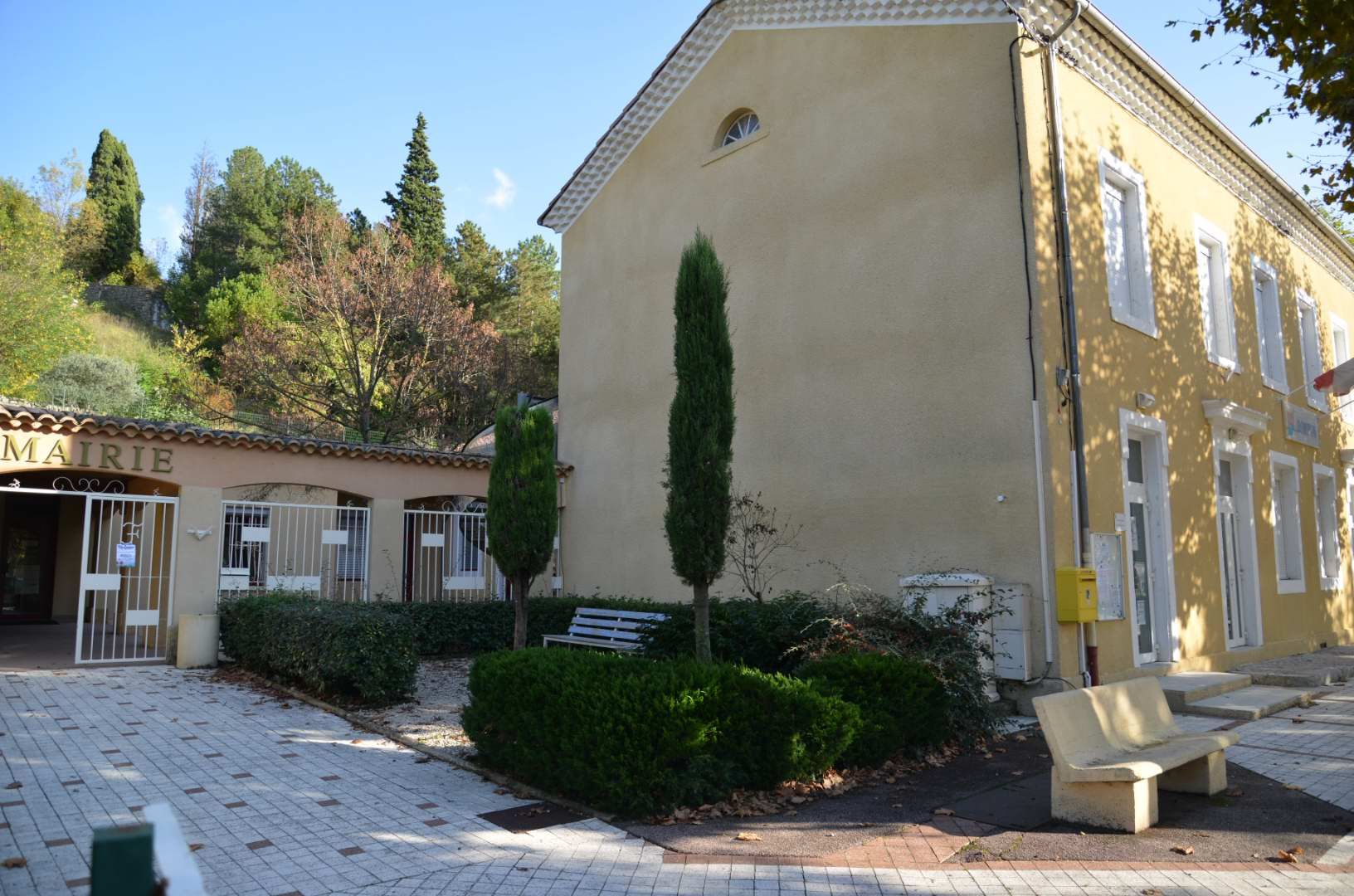 mairie de Rompon